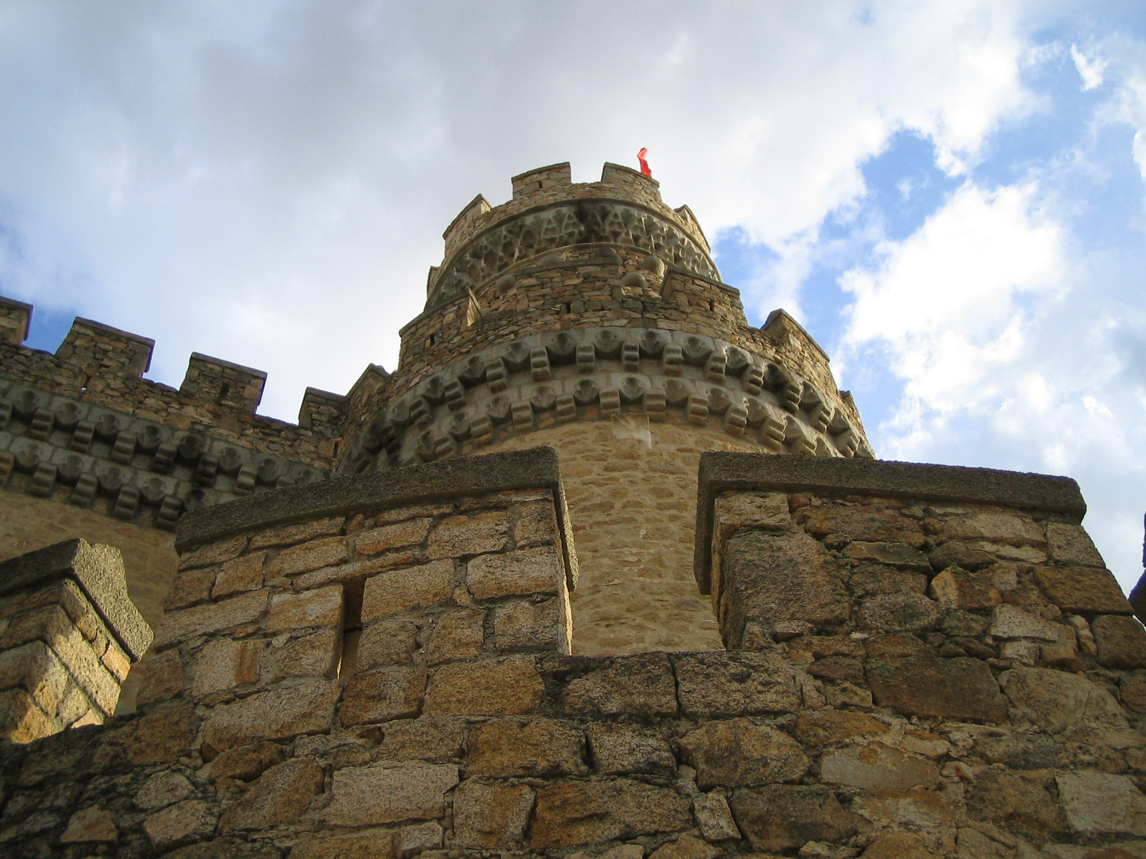 Castillo de Manzanares el Real en Madrid